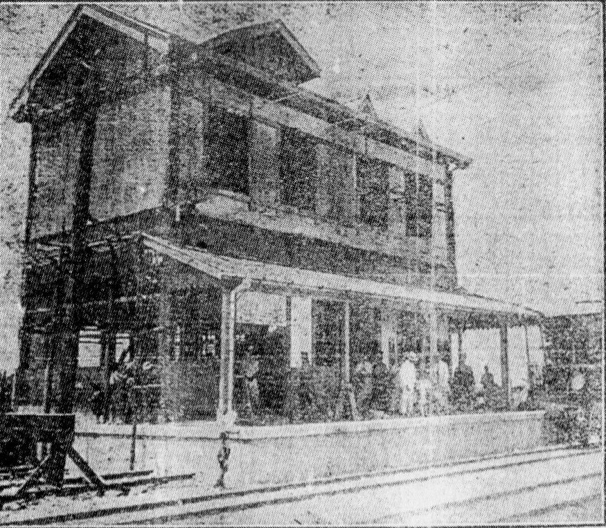 『北陸タイムス』（1924年（大正13年）10月3日）より。